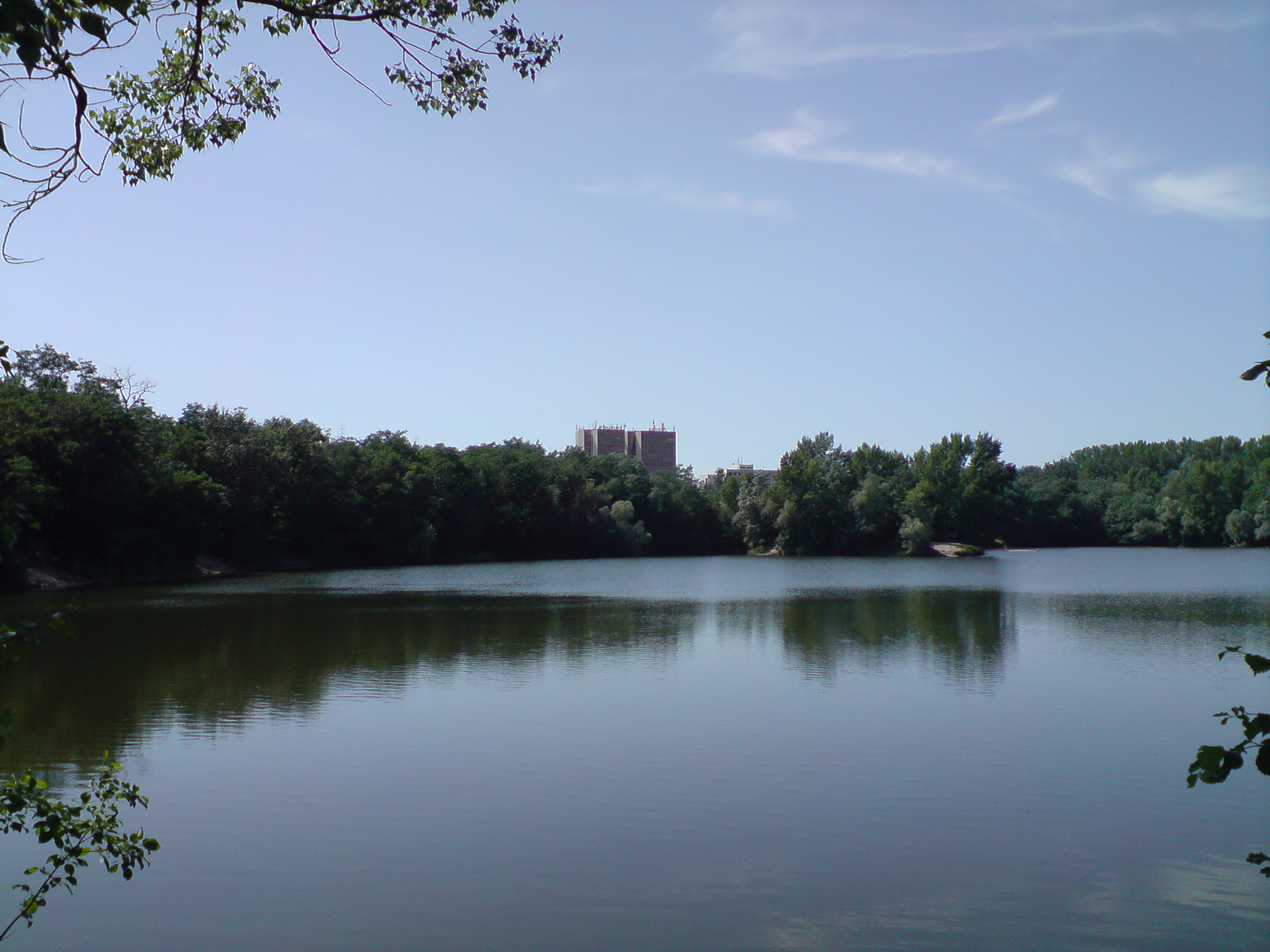 Malý Draždiak